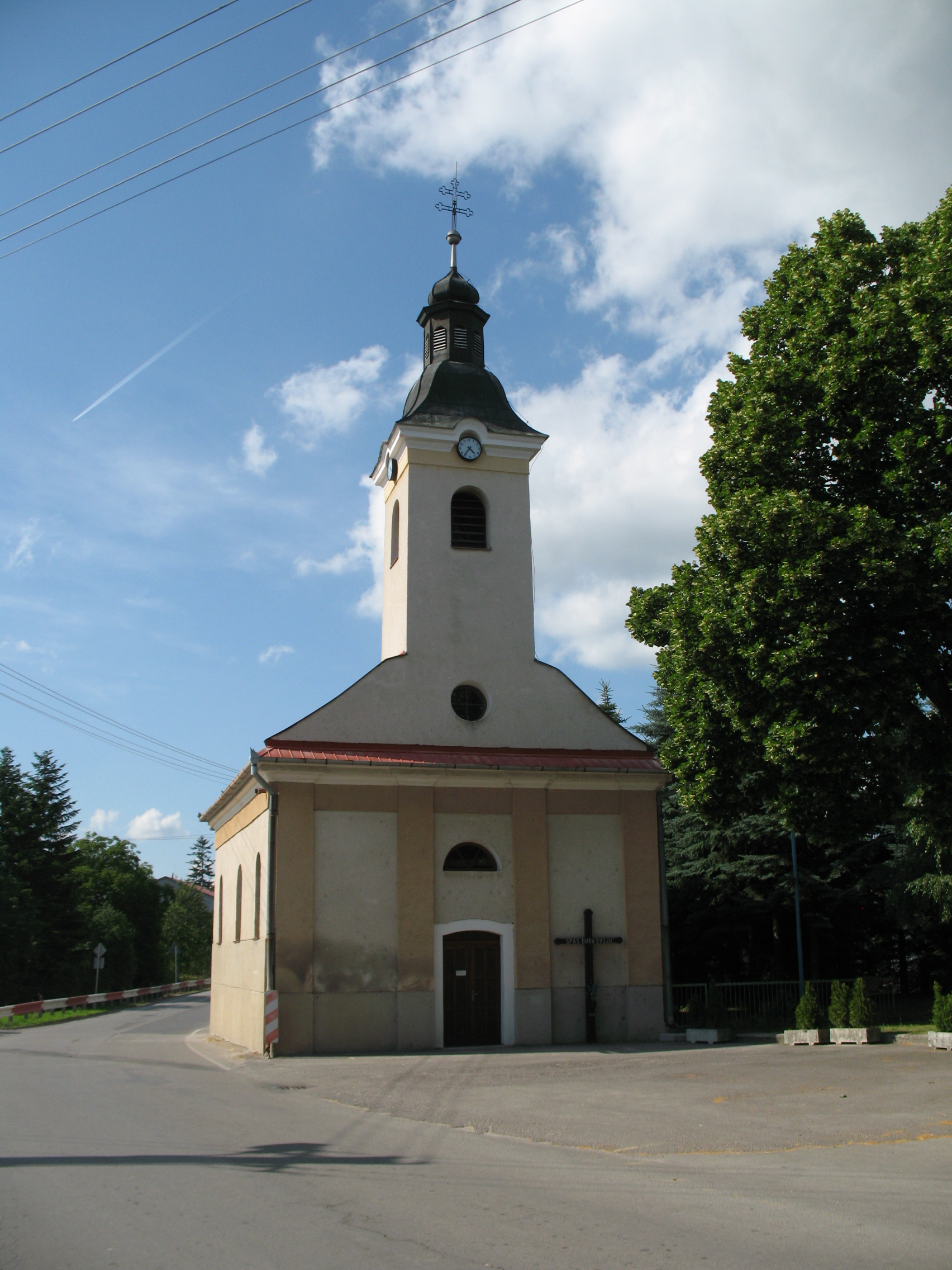 Hornyán